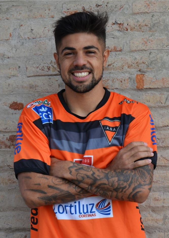 Furbolista